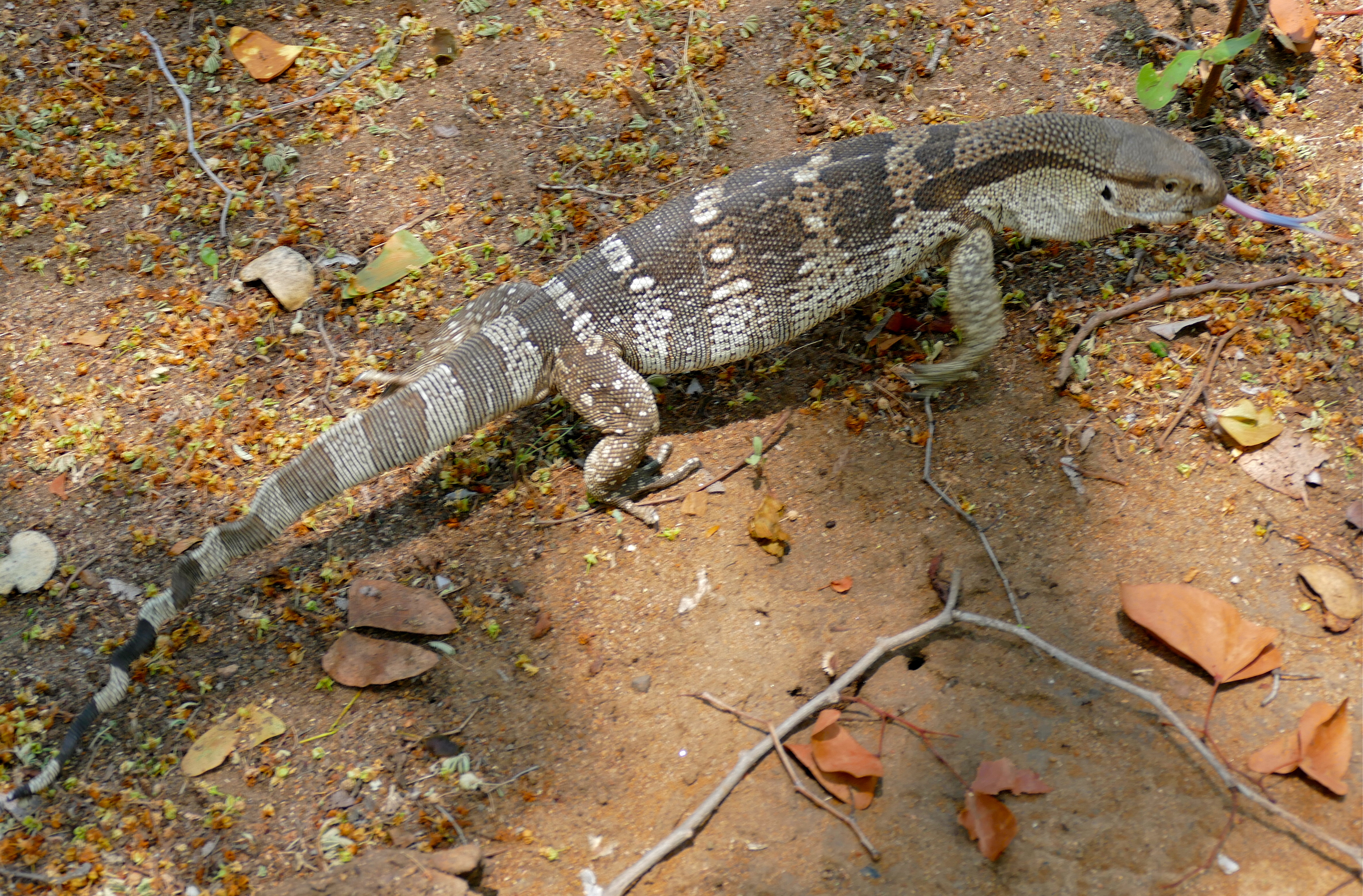 Letaba Camp, Kruger NP, SOUTH AFRICA